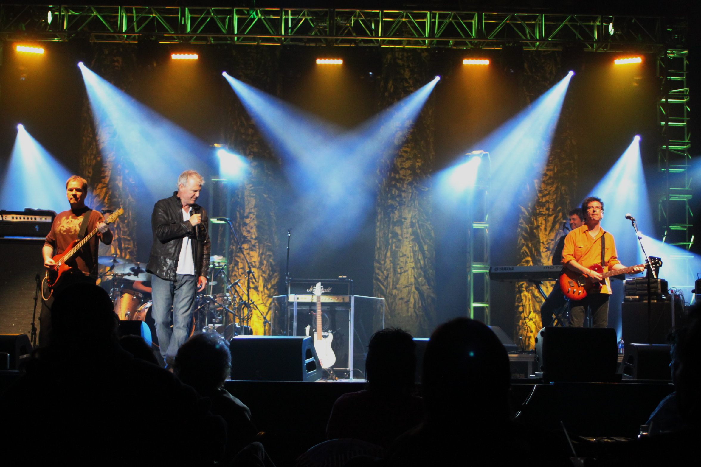 Glass Tiger 25